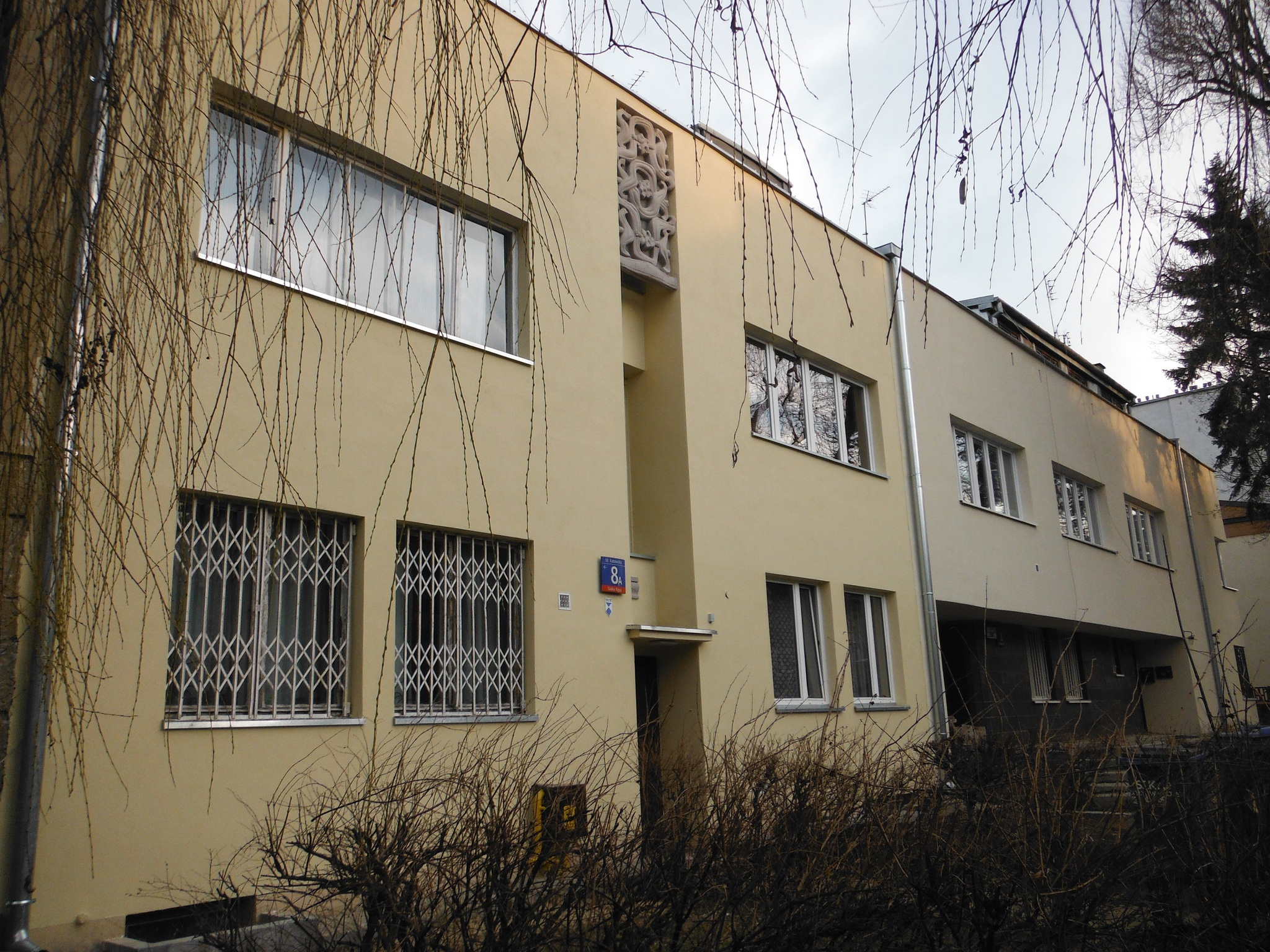 Kamienica Toeplitza przy ul. Katowickiej 8A w Warszawie. Zaprojektowana przez Henryka Oderfelda, 1935.